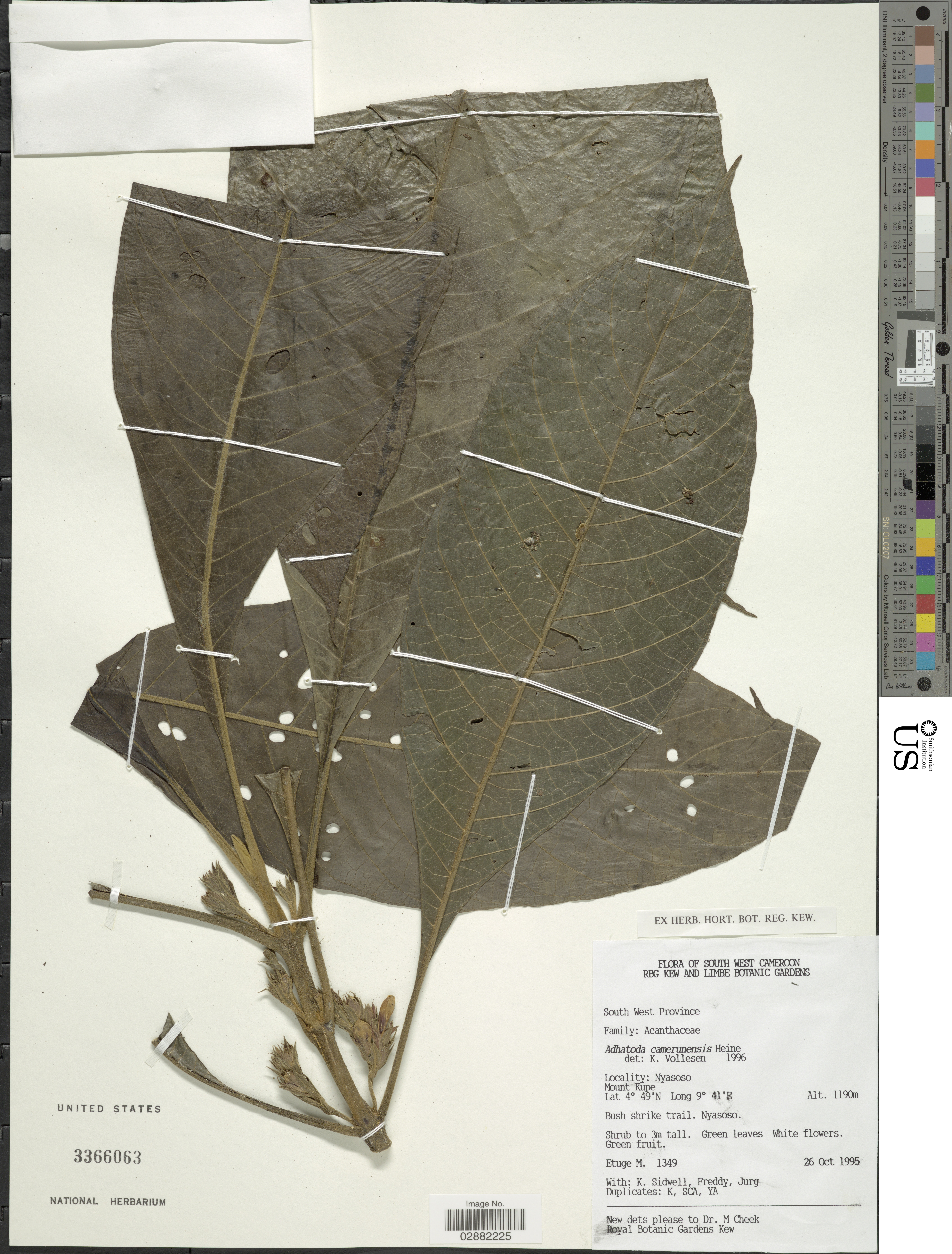 Justicia camerunensis (Heine) I. Darbysh. Object Details Record Last Modified 17 Sep 2018 Specimen Count 1 Collection Date 26 Oct 1995 Barcode 02882225 USNM Number 3366063 Biogeographical Region 23 - West-Central Tropical Africa Collector Martin Etuge K. Sidwell -- Freddy Jurg Min. Elevation 1190 Place South West Cameroon. Nyasoso. Mount Kupe. Nyasoso., Sud-Ouest, Cameroon, Africa Published Name Justicia camerunensis (Heine) I. Darbysh. See more items in Botany Flowering plants and ferns Taxonomy Plantae Dicotyledonae Scrophulariales Acanthaceae NMNH - Botany Dept. Record ID nmnhbotany_14167580 Metadata Usage CC0